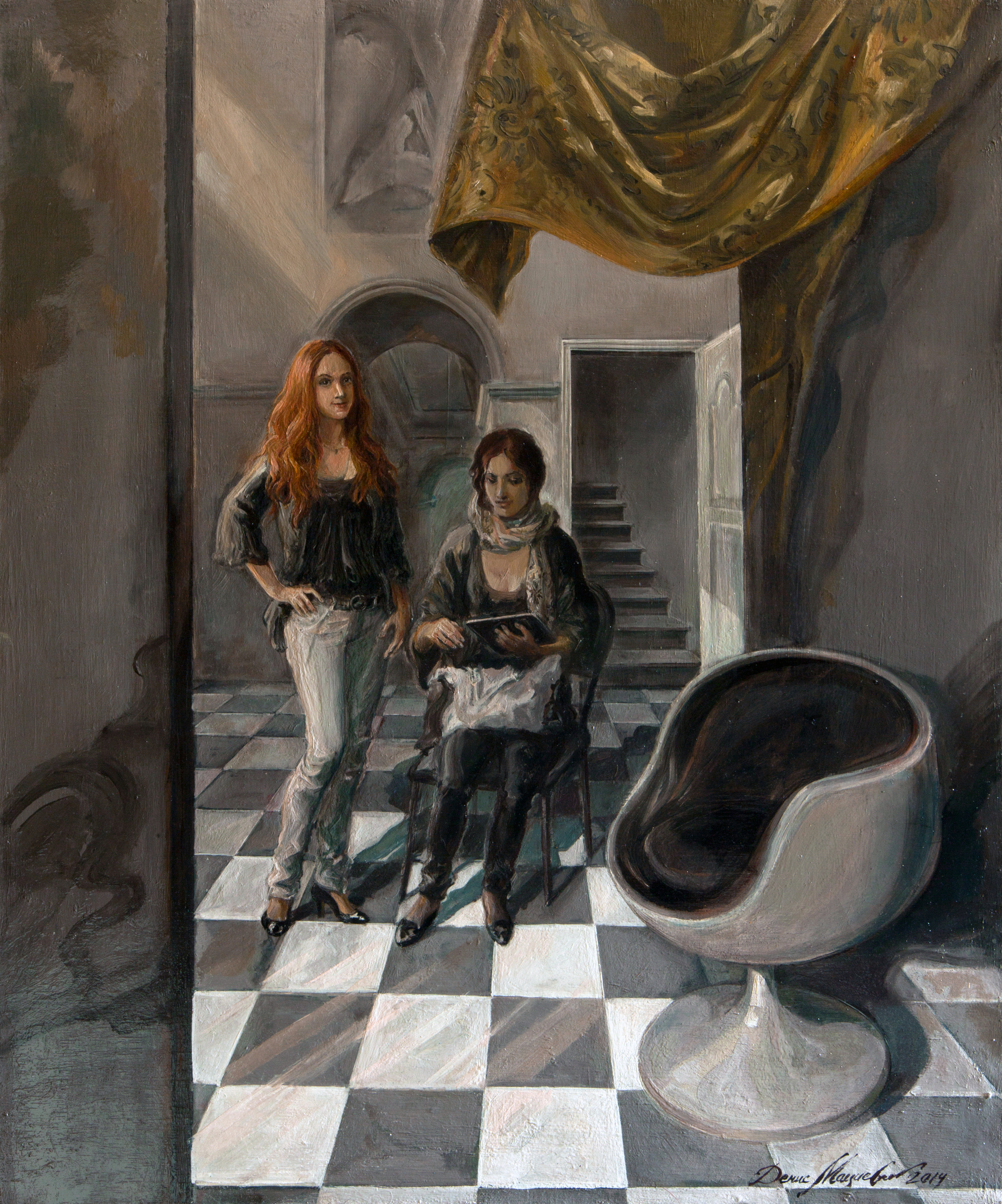 Денис Мациевский, "Электронное письмо", 60x50, холст, масло, 2014г.